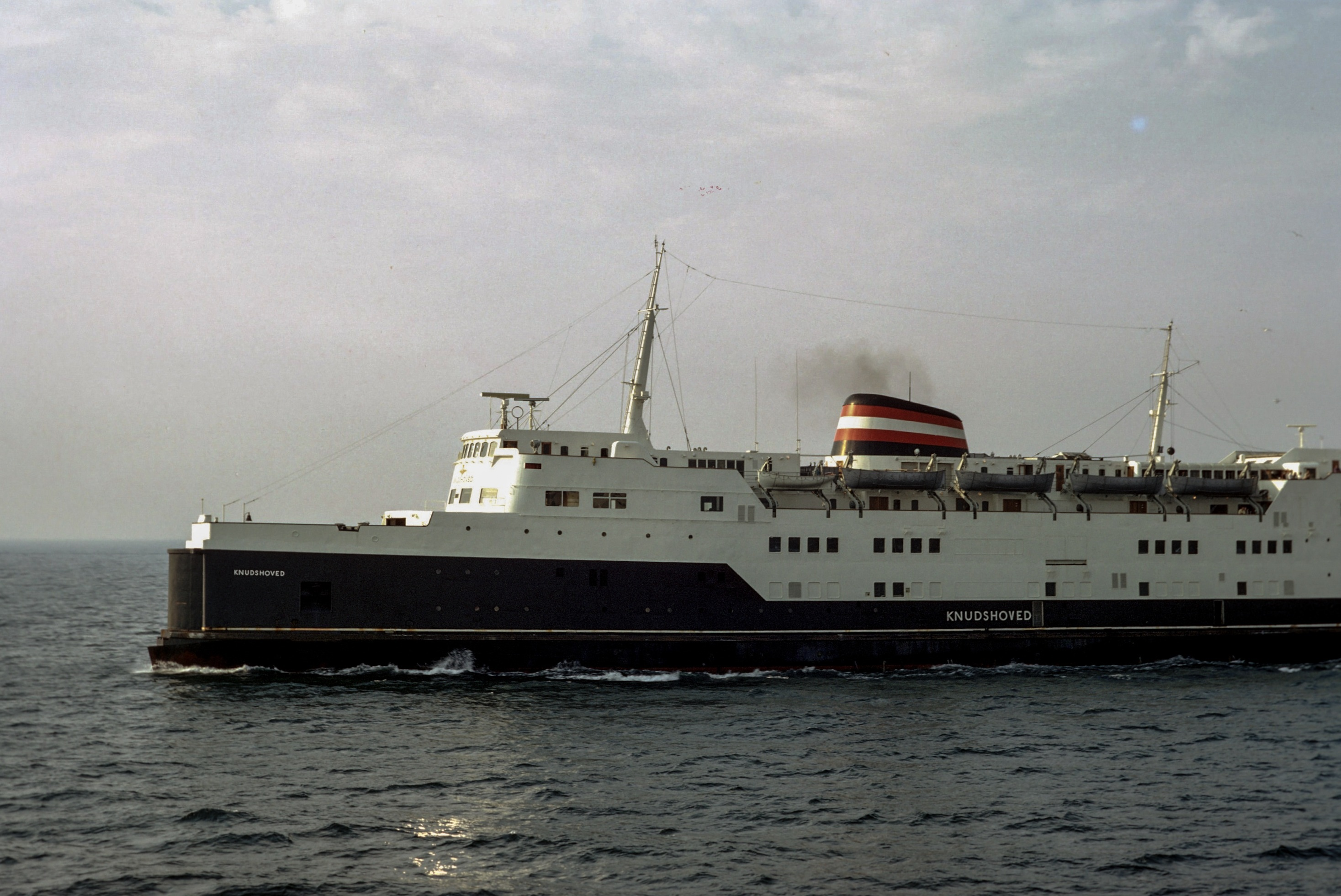 Le ferry-boat M/F "Knudshoved" traversant le détroit du Storebælt (Grand Belt) dans le sens Korsør - Nyborg. Ce navire avait été lancé en 1960 et terminé en 1961. Il mesurait 109 mètres de long et 17 mètres de large. Il a changé de nom (Knud) et a été immatriculé à Saint-Vincent & Grenadines en 1997 avant de partir en Inde et y être démoli l' année suivante. IMO: 5190379. Durée d' utilisation: 37 ans. Détroit du Storebælt, Danemark.